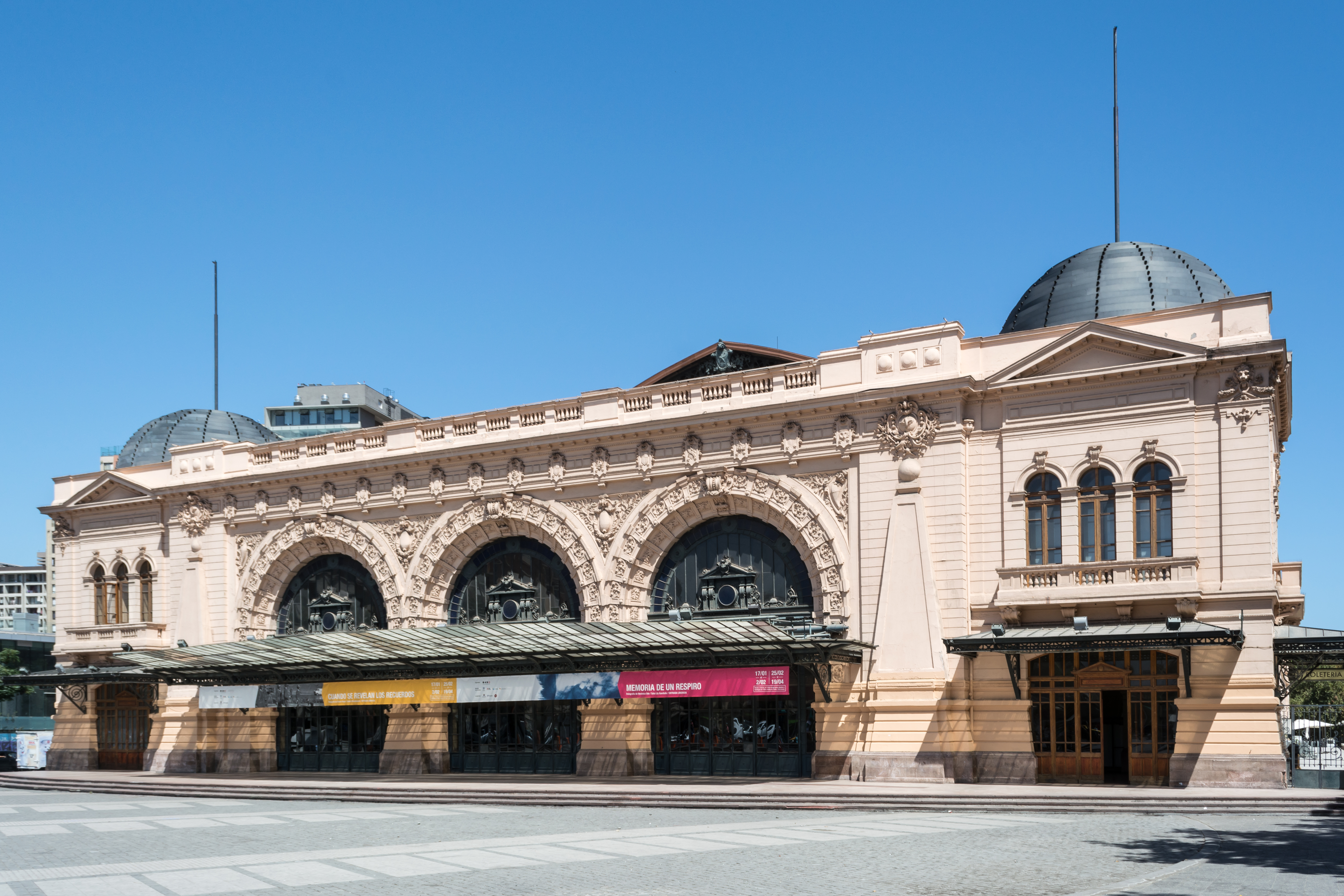 Centro Cultural Estación Mapocho, Santiago, Región Metropolitana, Chile